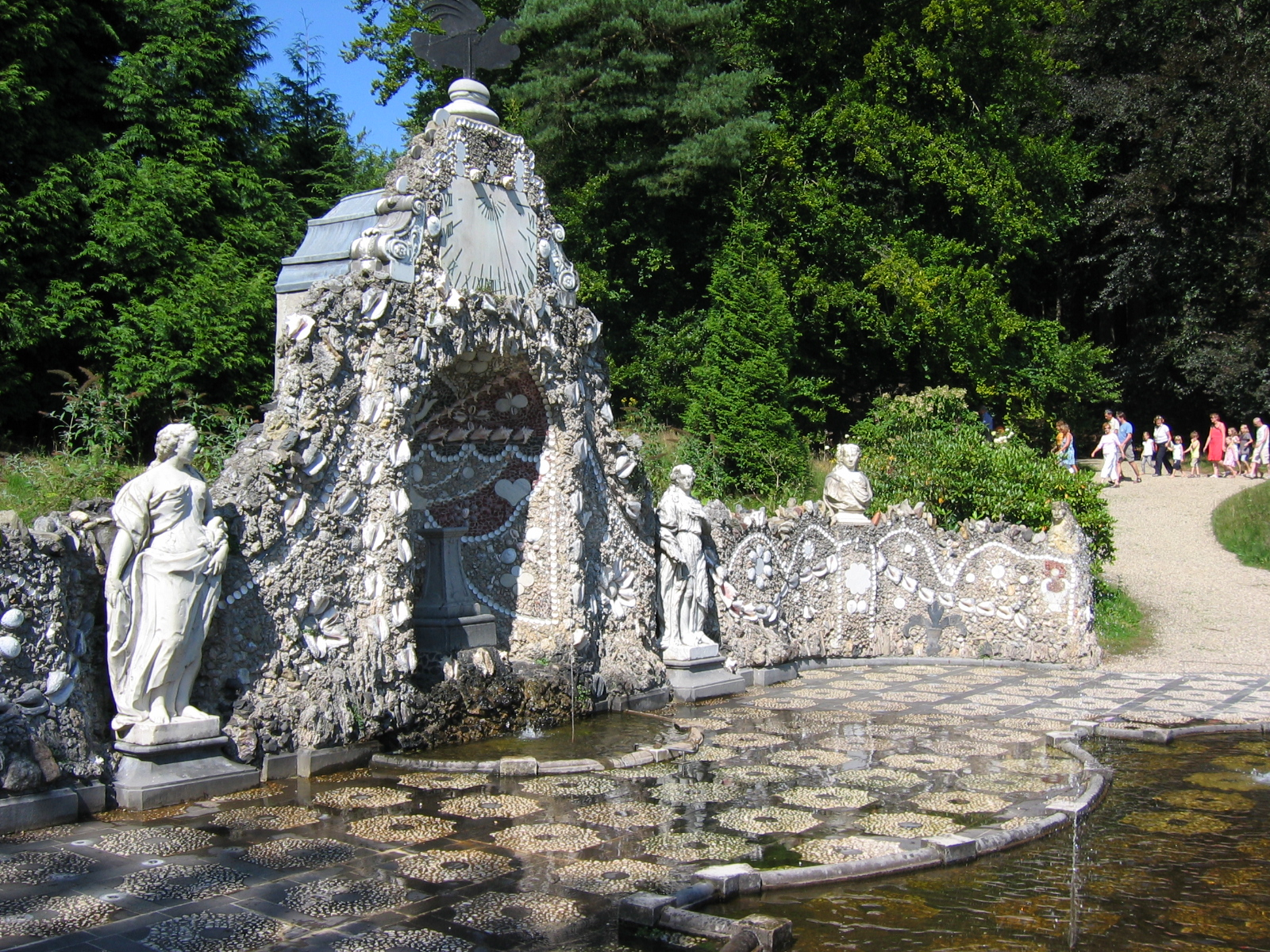 Bedriegertjes Landgoed Rosendael met kasteel en park. In het park bevinden zich onder andere de 'bedriegertjes', de schelpengalerij, theekoepel, rozentuin, oranjerie, vijvers, sprengenbeekjes, kettingbrug, bijzondere bomen en oud parkbos.